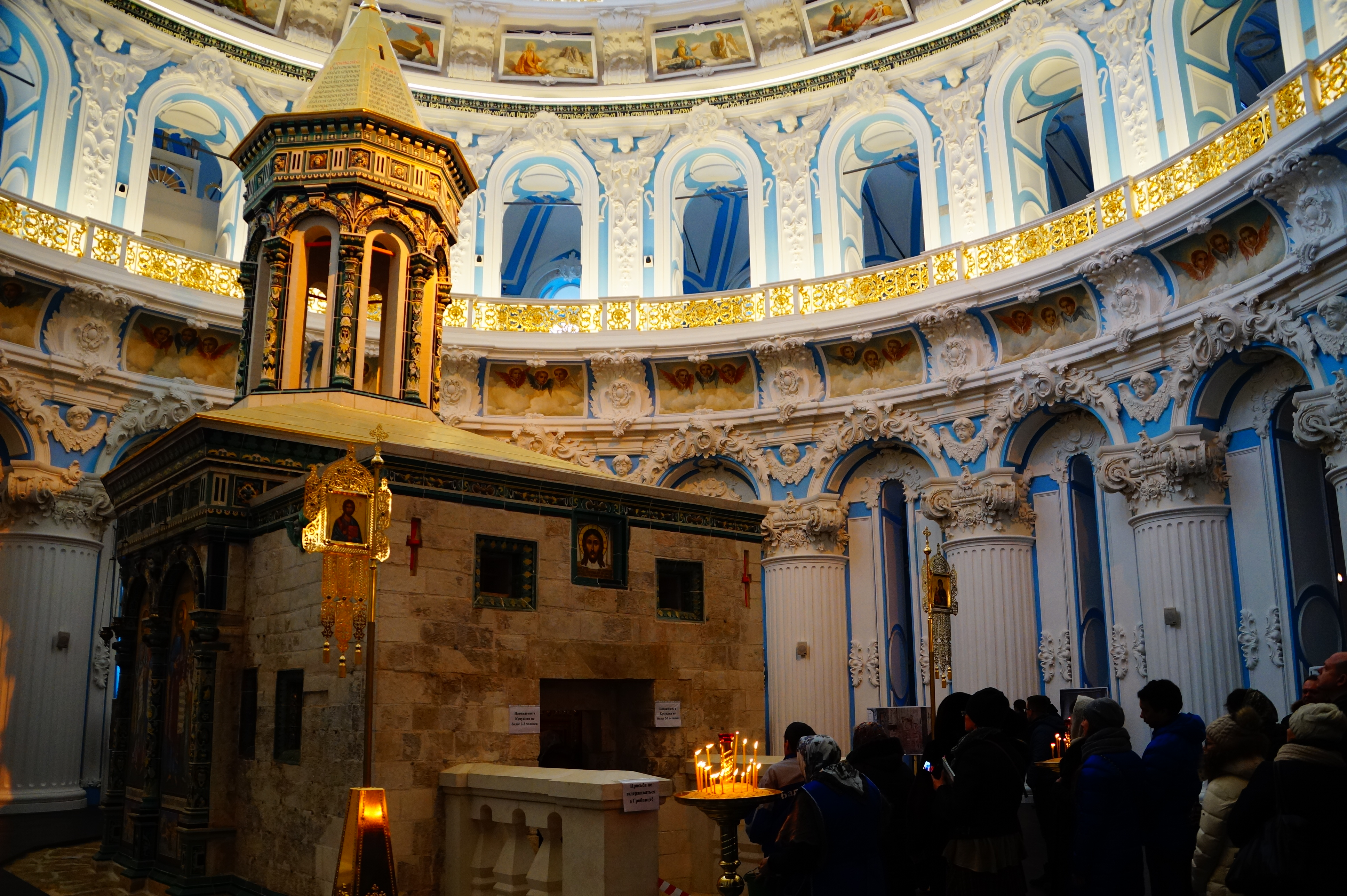 Собор Воскресения Христова: улица Советская, 2, Истра, Истринский район, Московская область